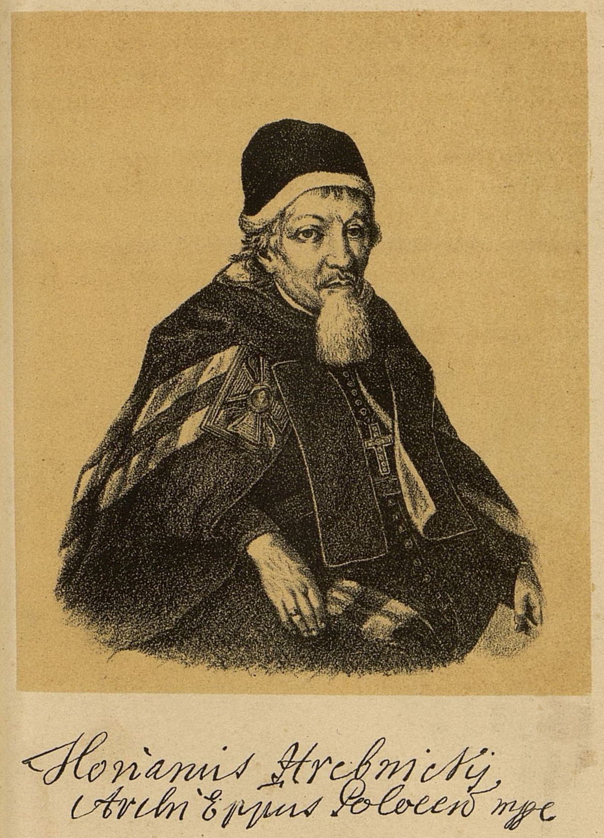 Беларуская (тарашкевіца): Партрэт Флярыяна Грабніцкага (Flaryjan Hrabnicki)